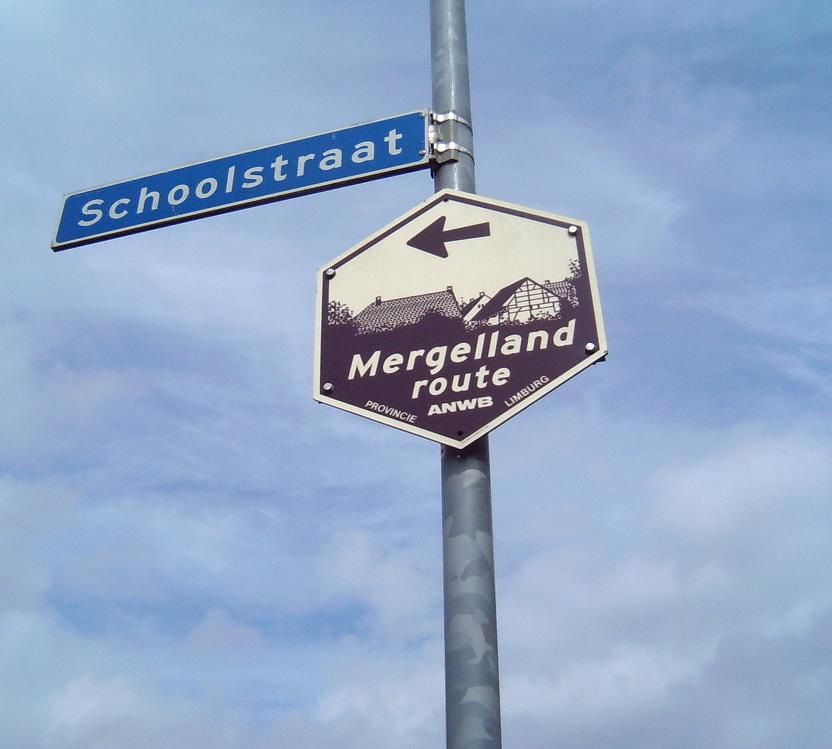 Limburgs: Mergellandroutebord in Hölsberg